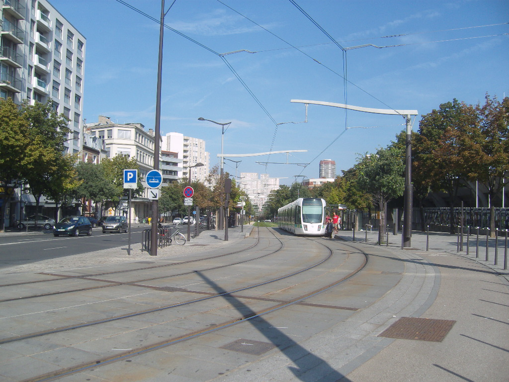 Paris 13e arrondissement, boulevard Kellermann, tramway T3, station Stade Charléty, vue en direction de la station Poterne des Peupliers